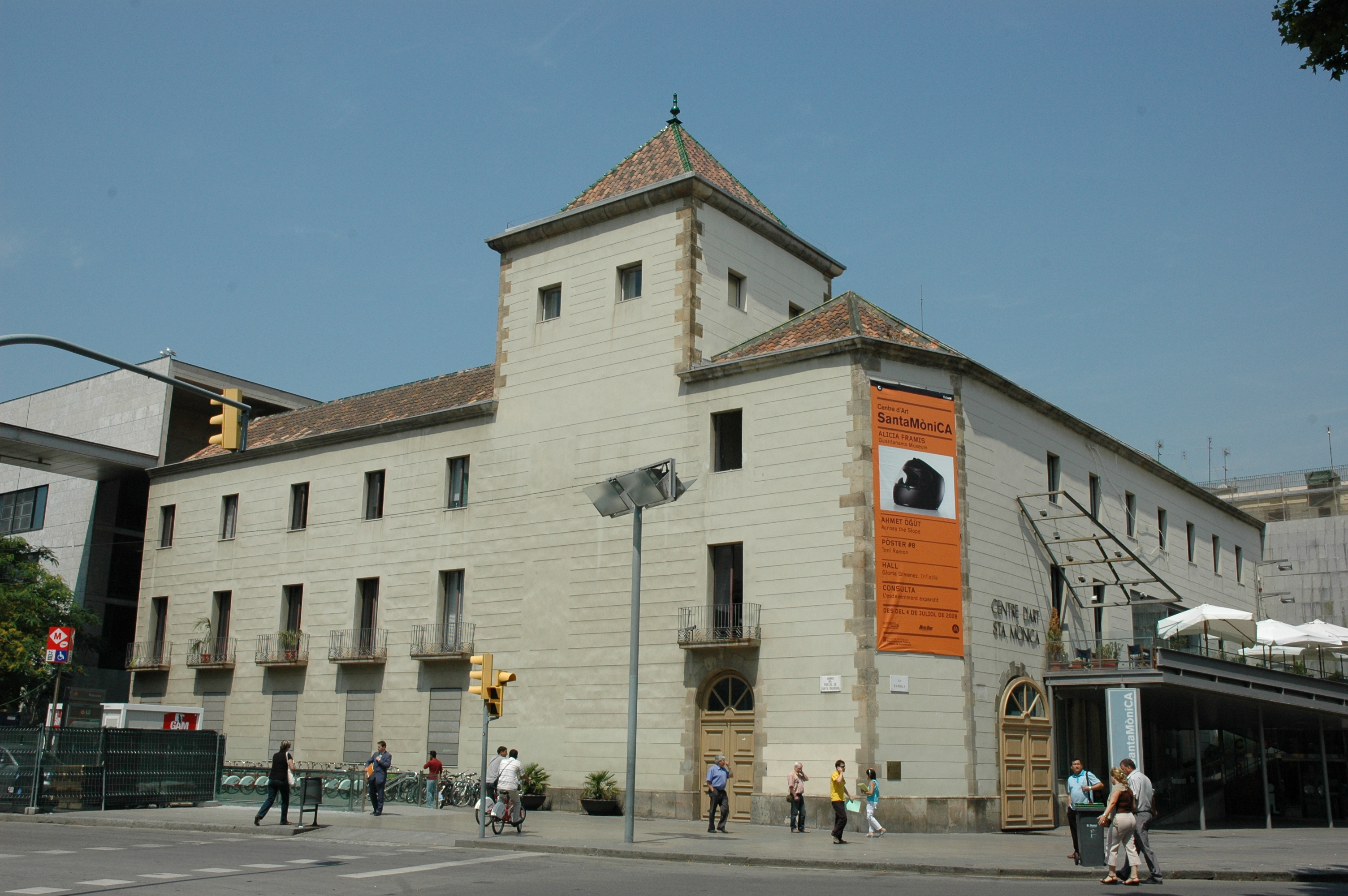 Centre d'Art Santa Mònica, al Raval (Barcelona). Antic Convent de Santa Mònica